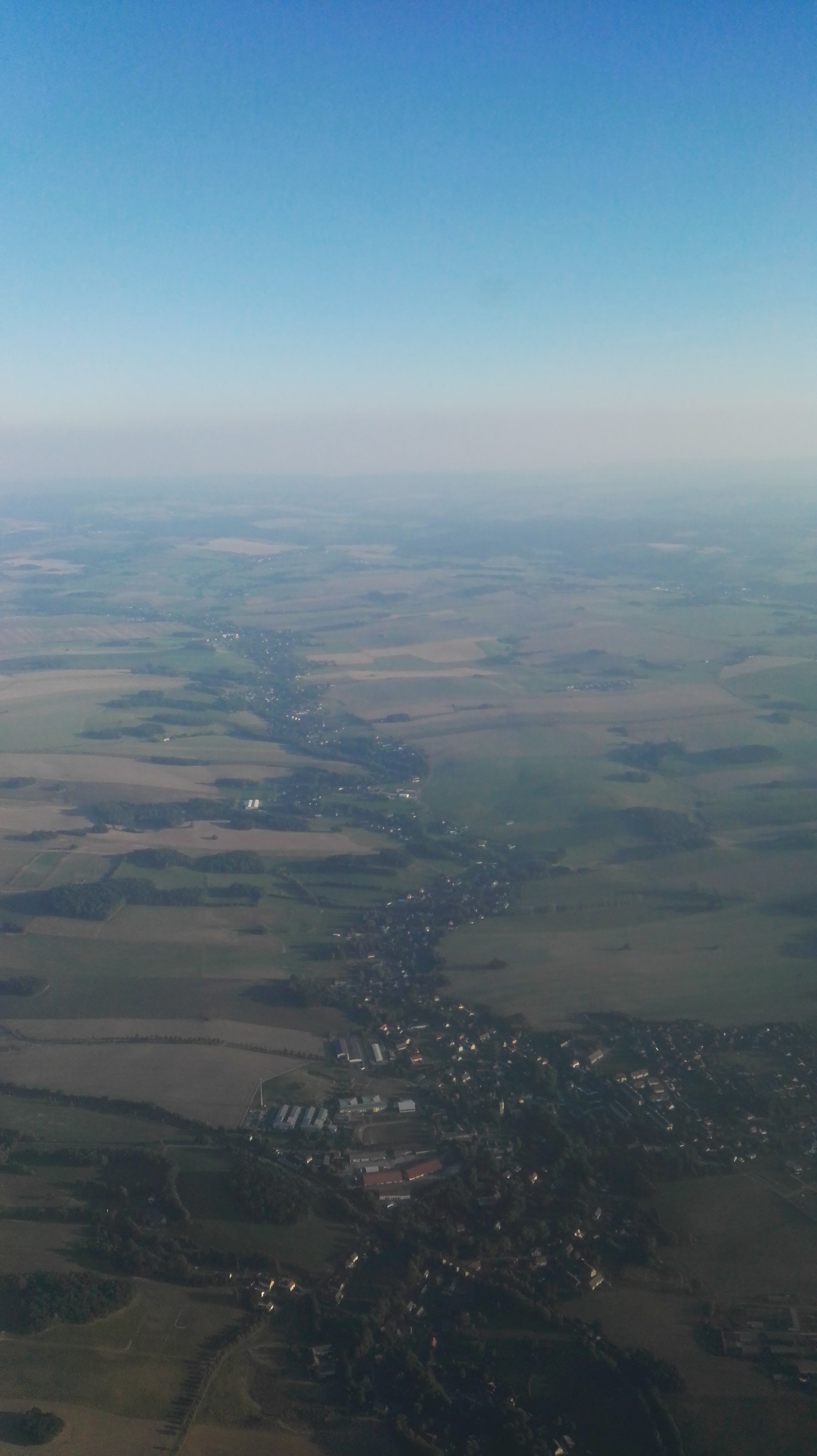 Niederbobritzsch